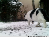 Vadkamerával lekapott házimacska egy Győri kertben